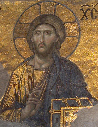 Hagia Sophia ; Deesis mosaic : Jesus; Istanbul, Turkey